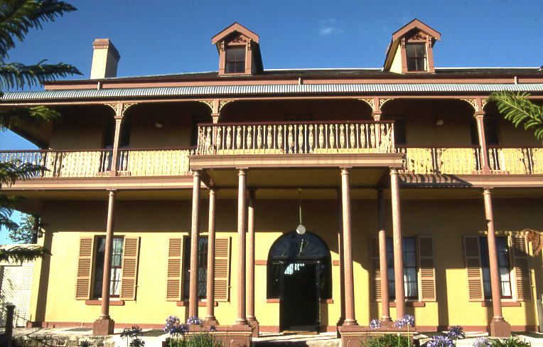 juniper hall, paddington, sydney